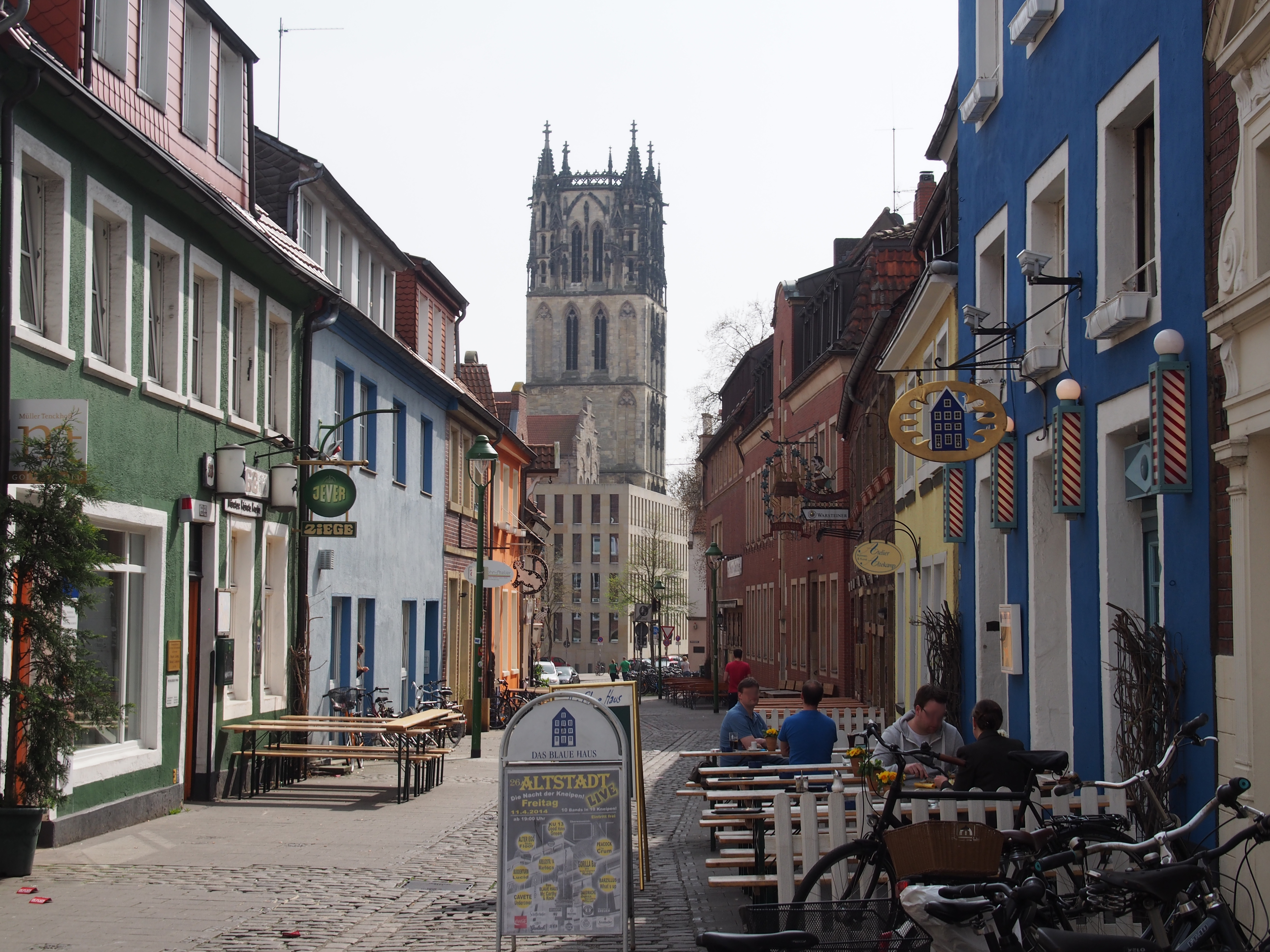 Kreuzstraße im Kuhviertel in Münster (Westfalen)